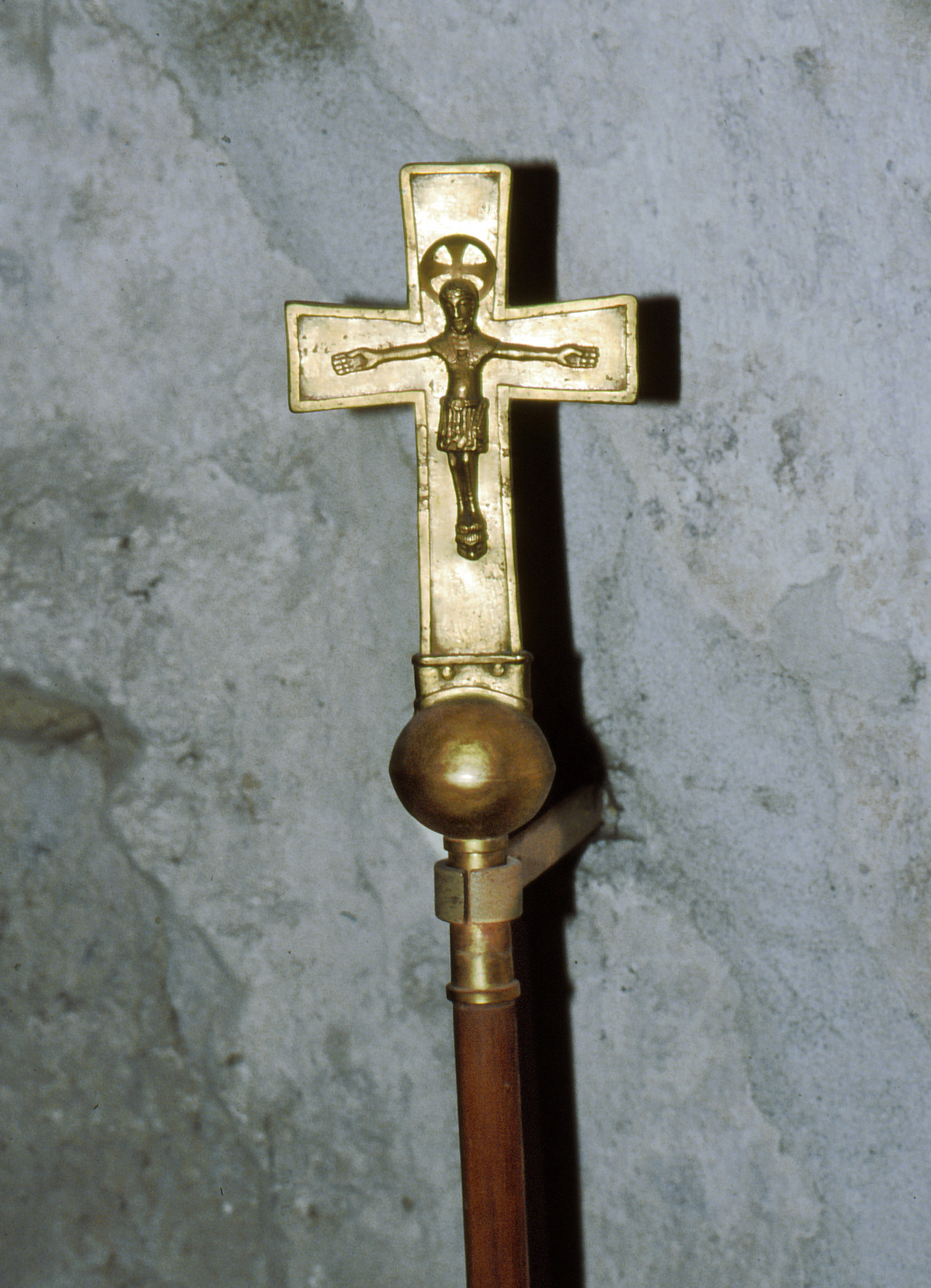 Feldebrői altemplom püspöki botjának keresztje (13. századi, román kori munka)